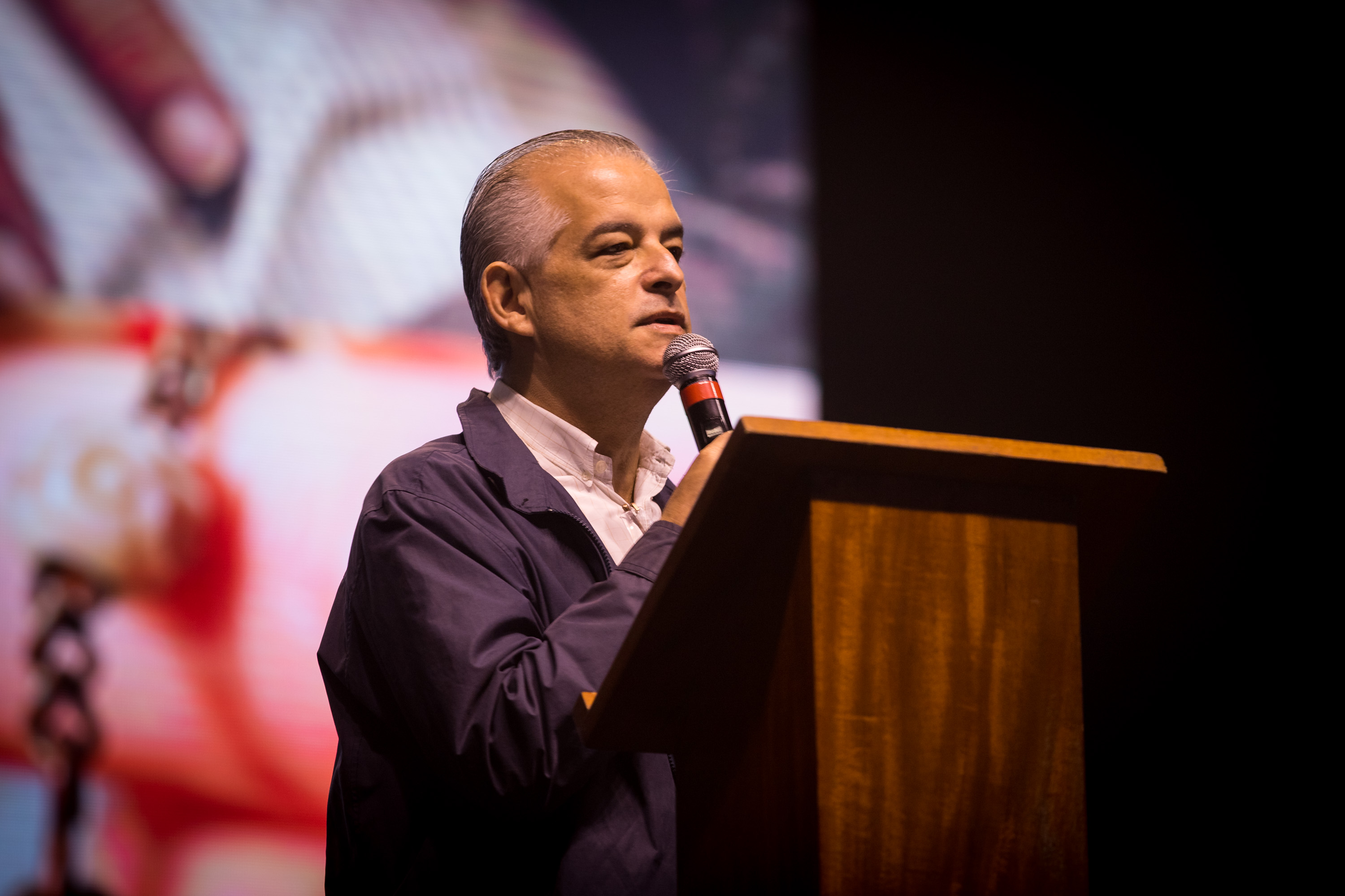 O Governador do estado de São Paulo, Márcio França, participa do evento Abraça São Paulo, realizado pela Canção Nova.Data: 15/04/2018Local: São Paulo/SPFoto: Governo do Estado de São Paulo